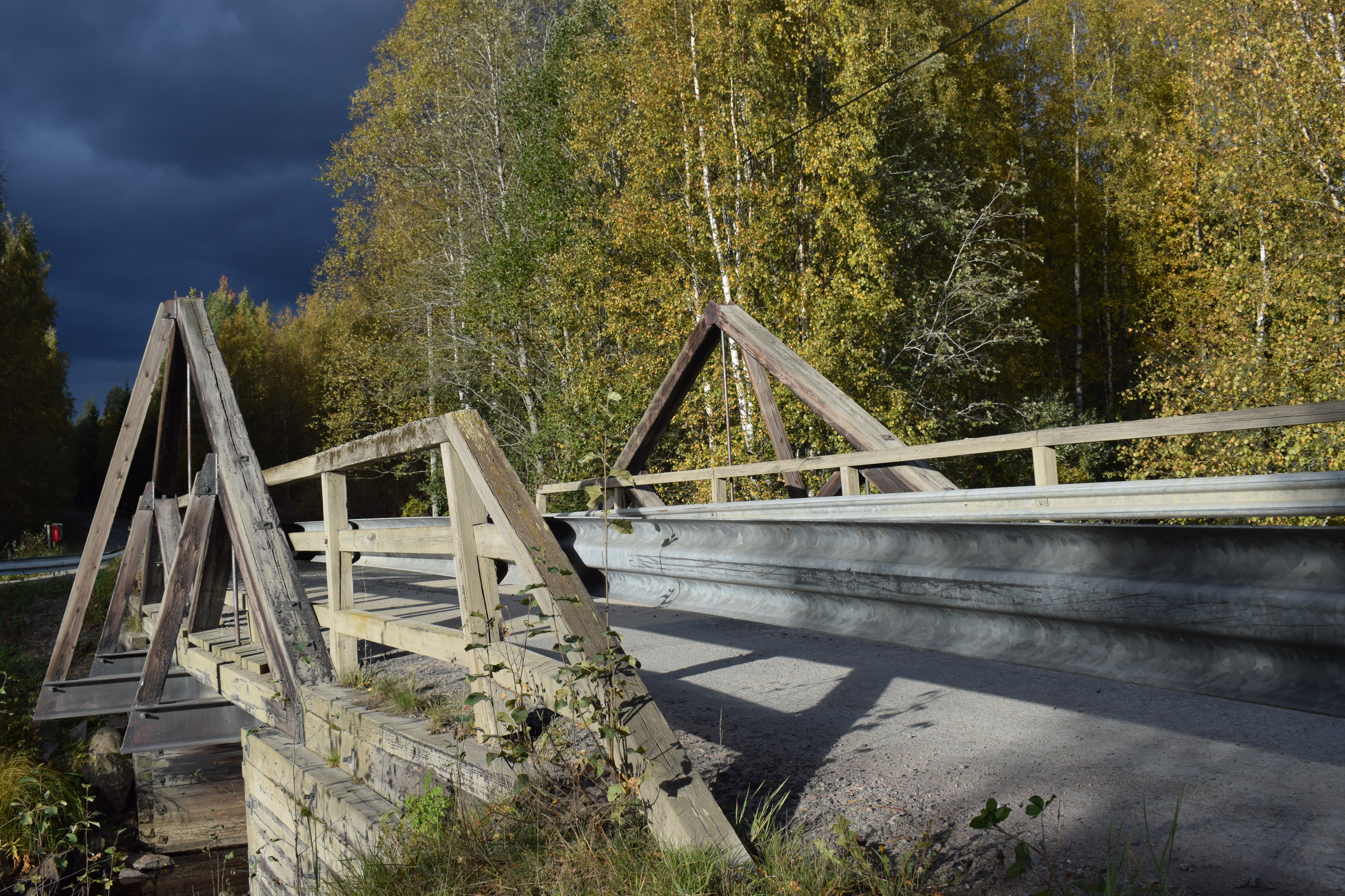 Markkulan silta